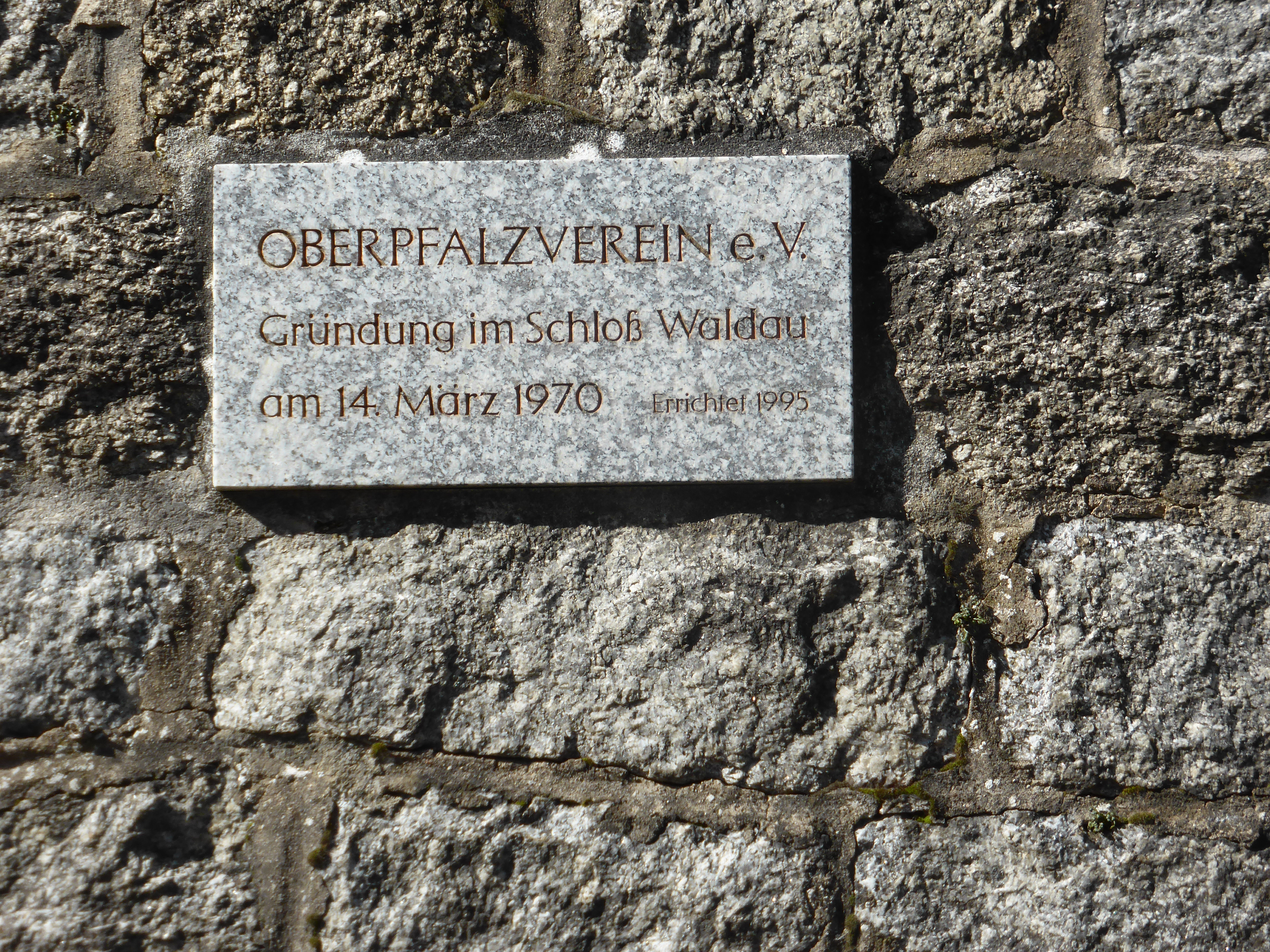 Schloss (Vohenstrauß)